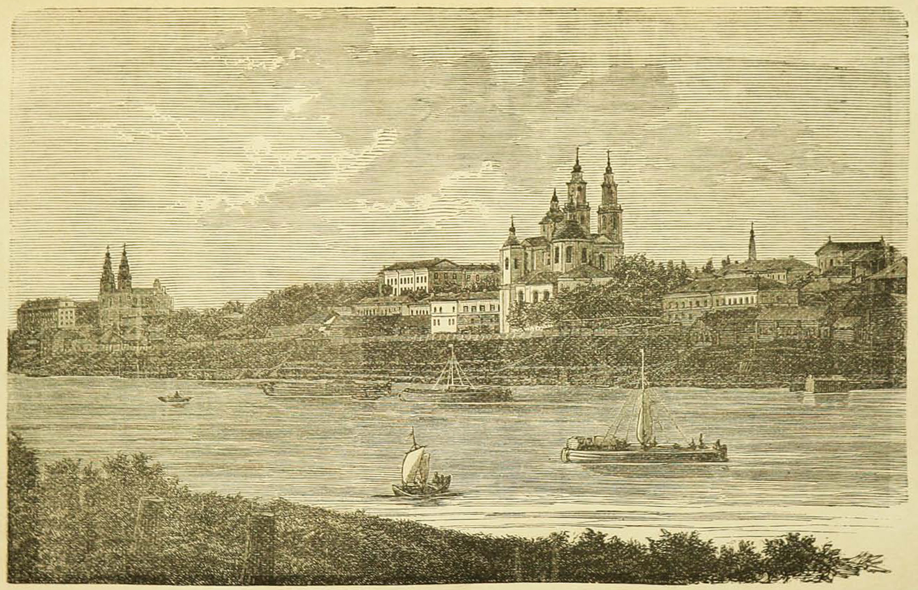 Беларуская (тарашкевіца): Полацак (Połacak), рака Дзьвіна (Dźvina)